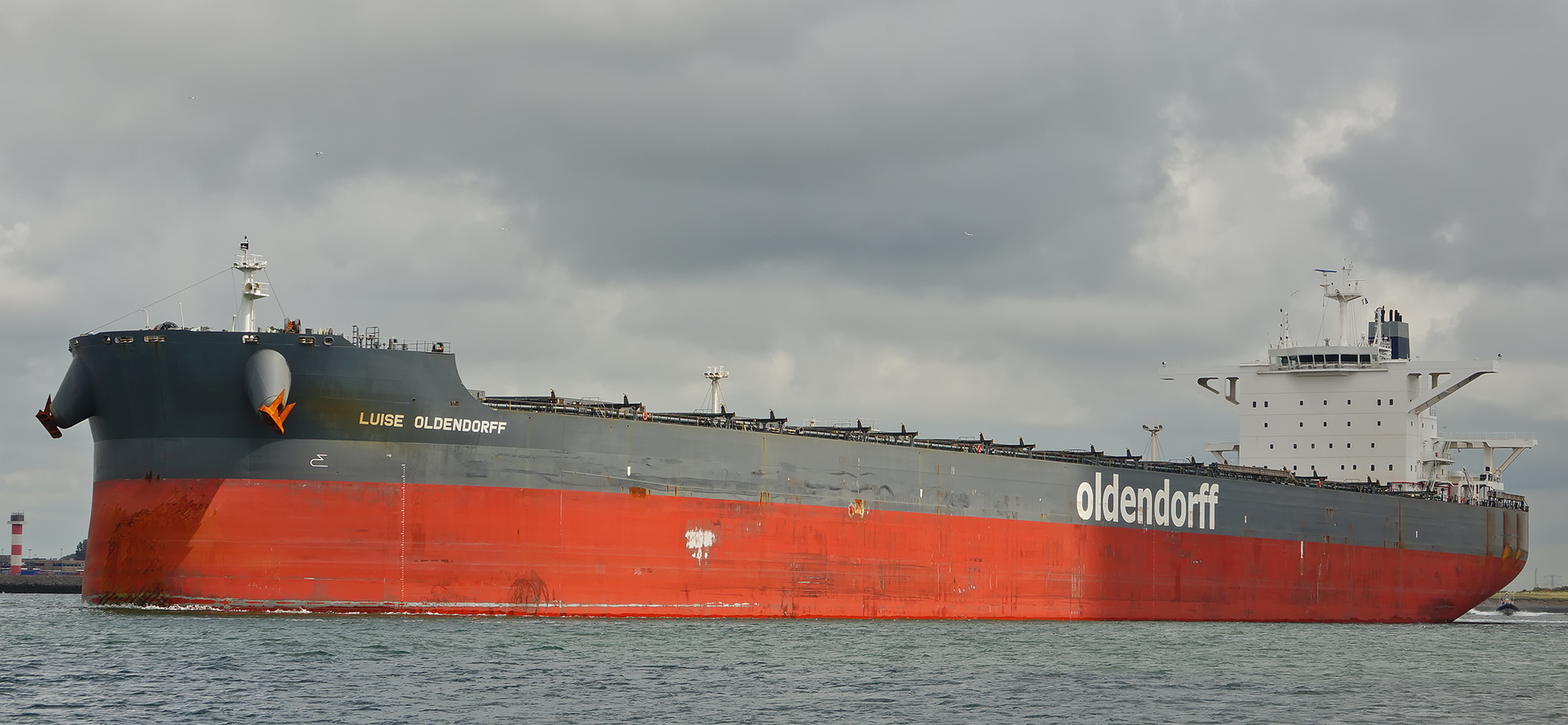 Calandkanaal Europoort 12-8-2017 gezien vanaf DE NIEUWE PRINS